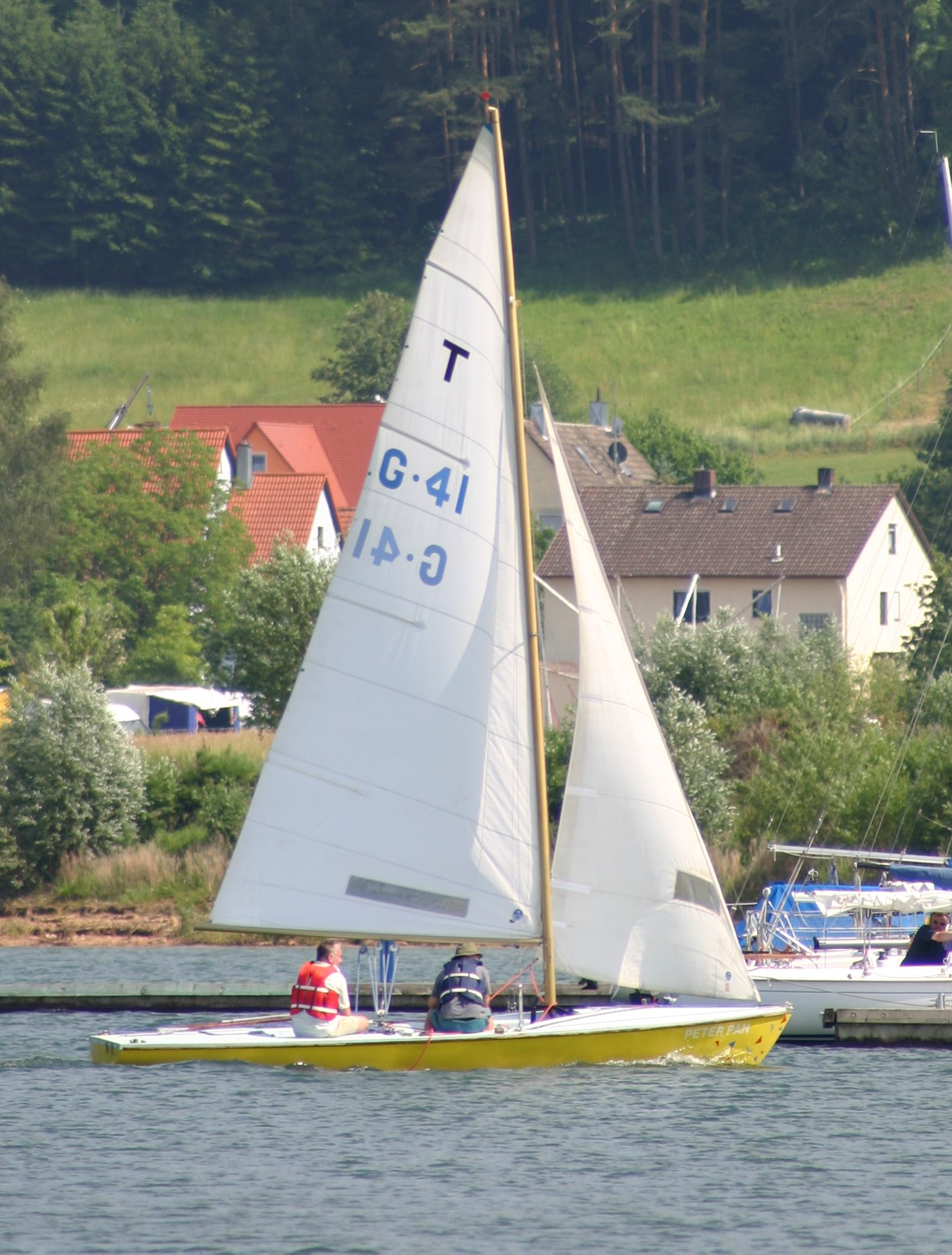 Tempest vor Ramsberg